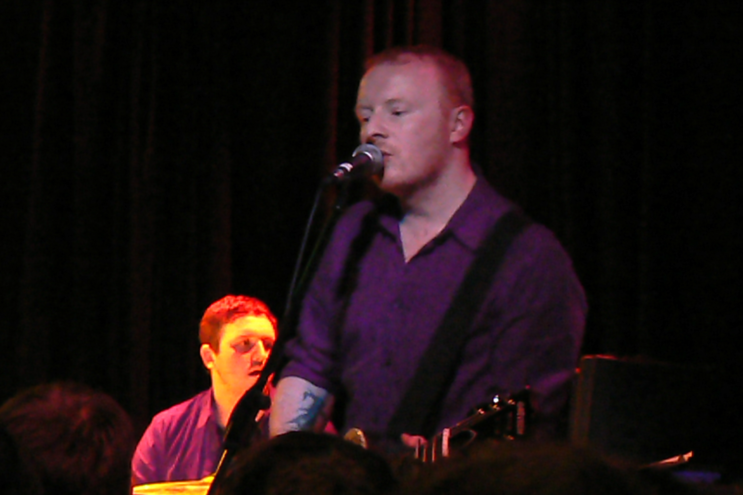 Malcolm Middleton at The Tunnels, Aberdeen